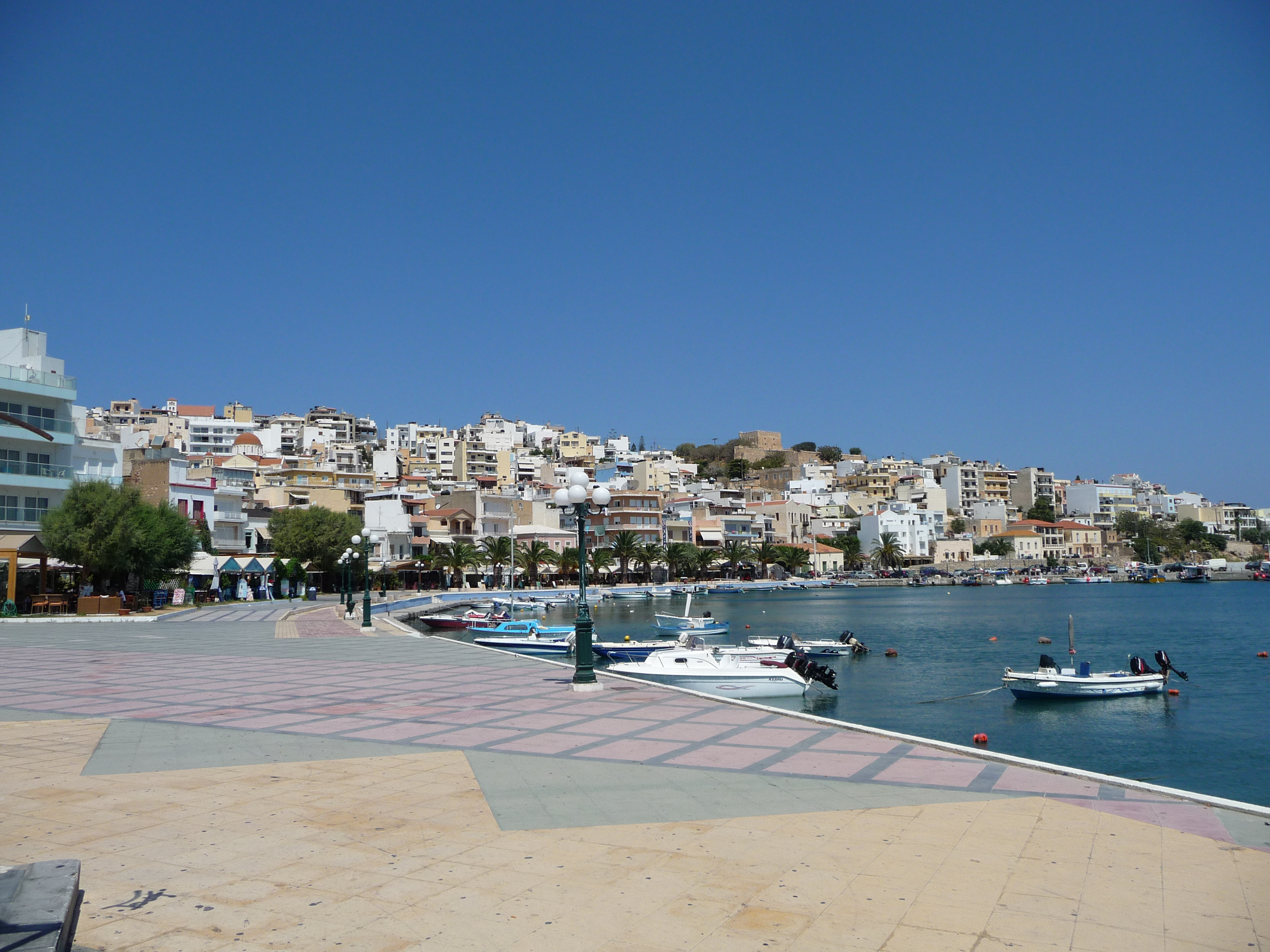 Hafenpromenade in Sitia (Kreta)